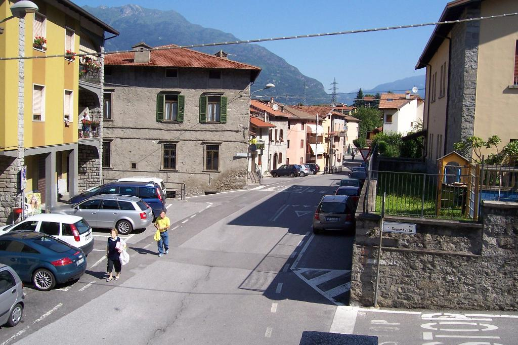 Braone